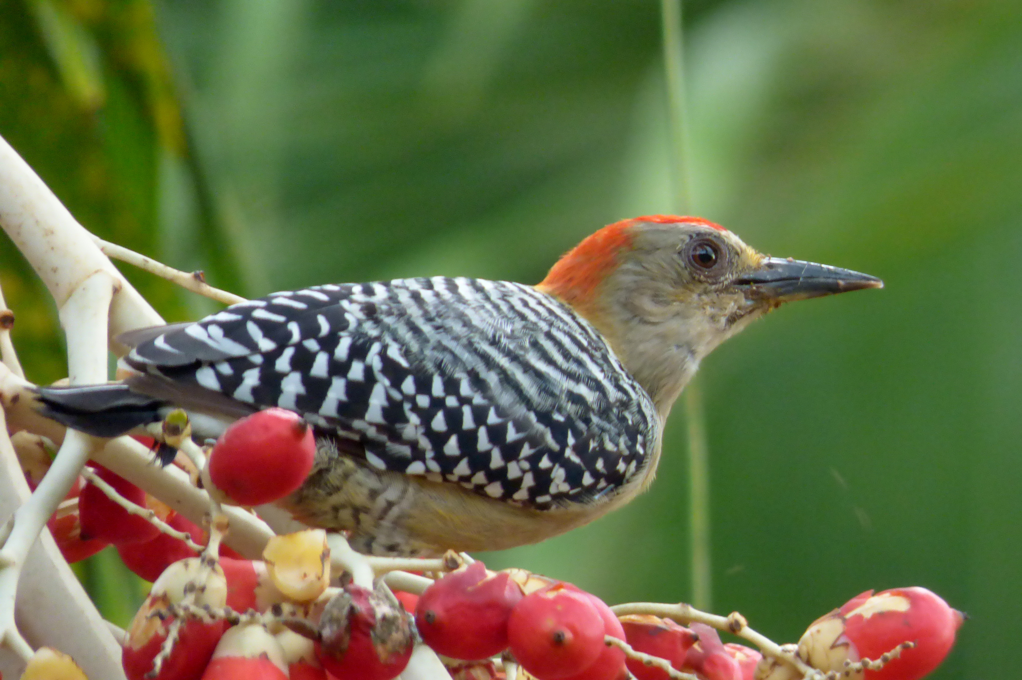 Melanerpes rubricapillus (Carpintero habado)